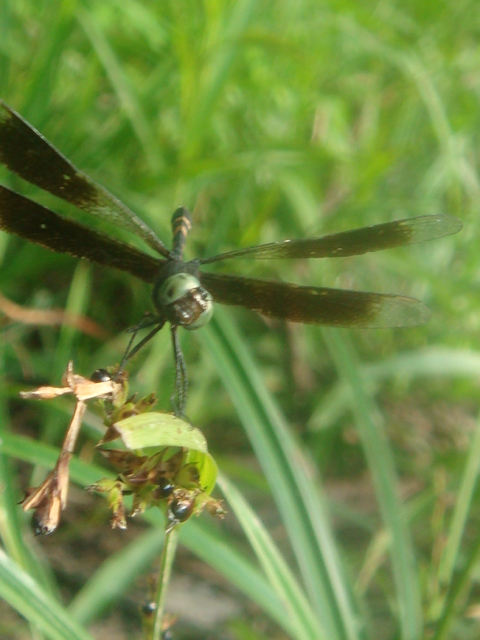 Libelula, Amazonas